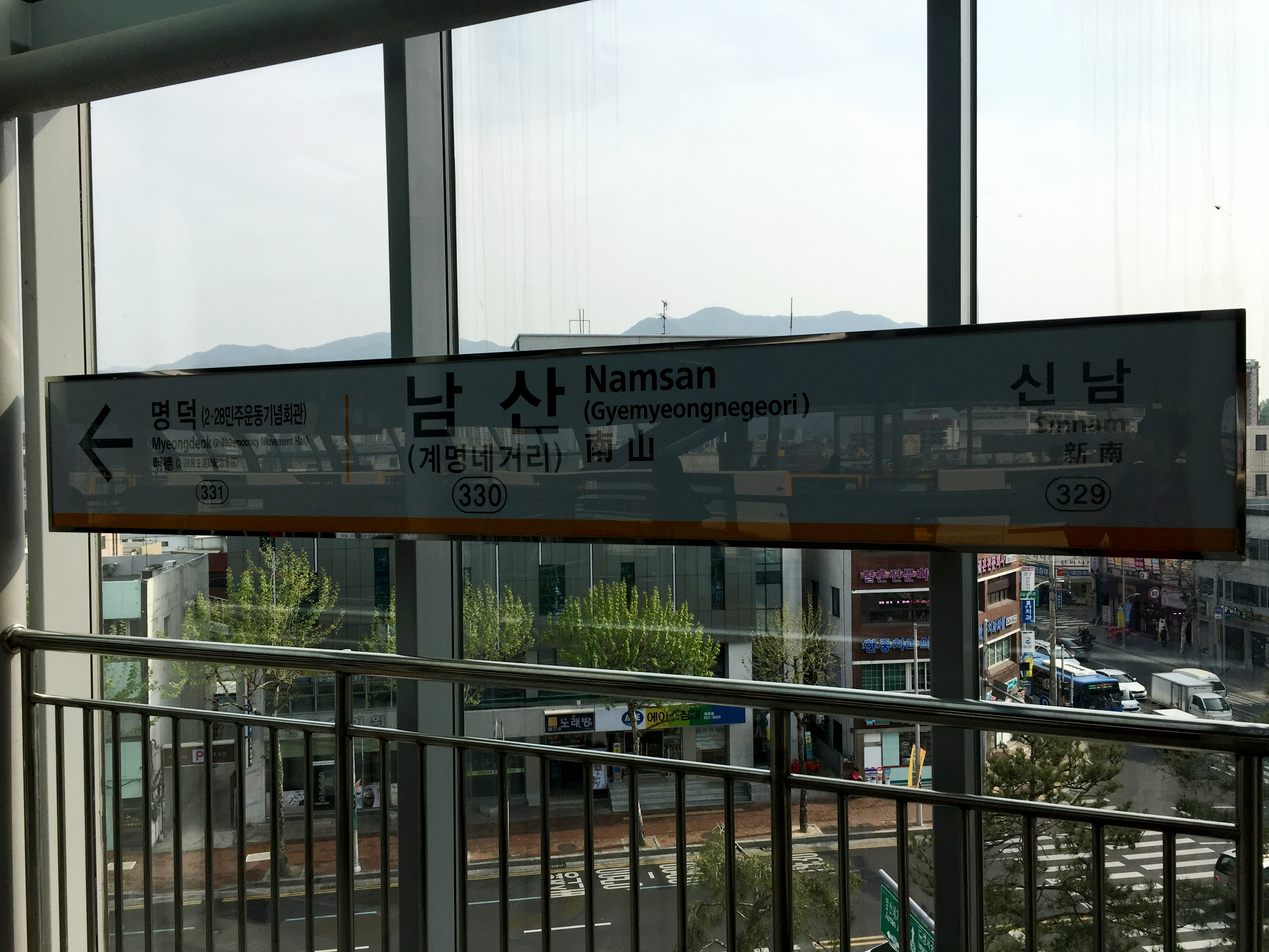 남산(계명네거리)역 역명판